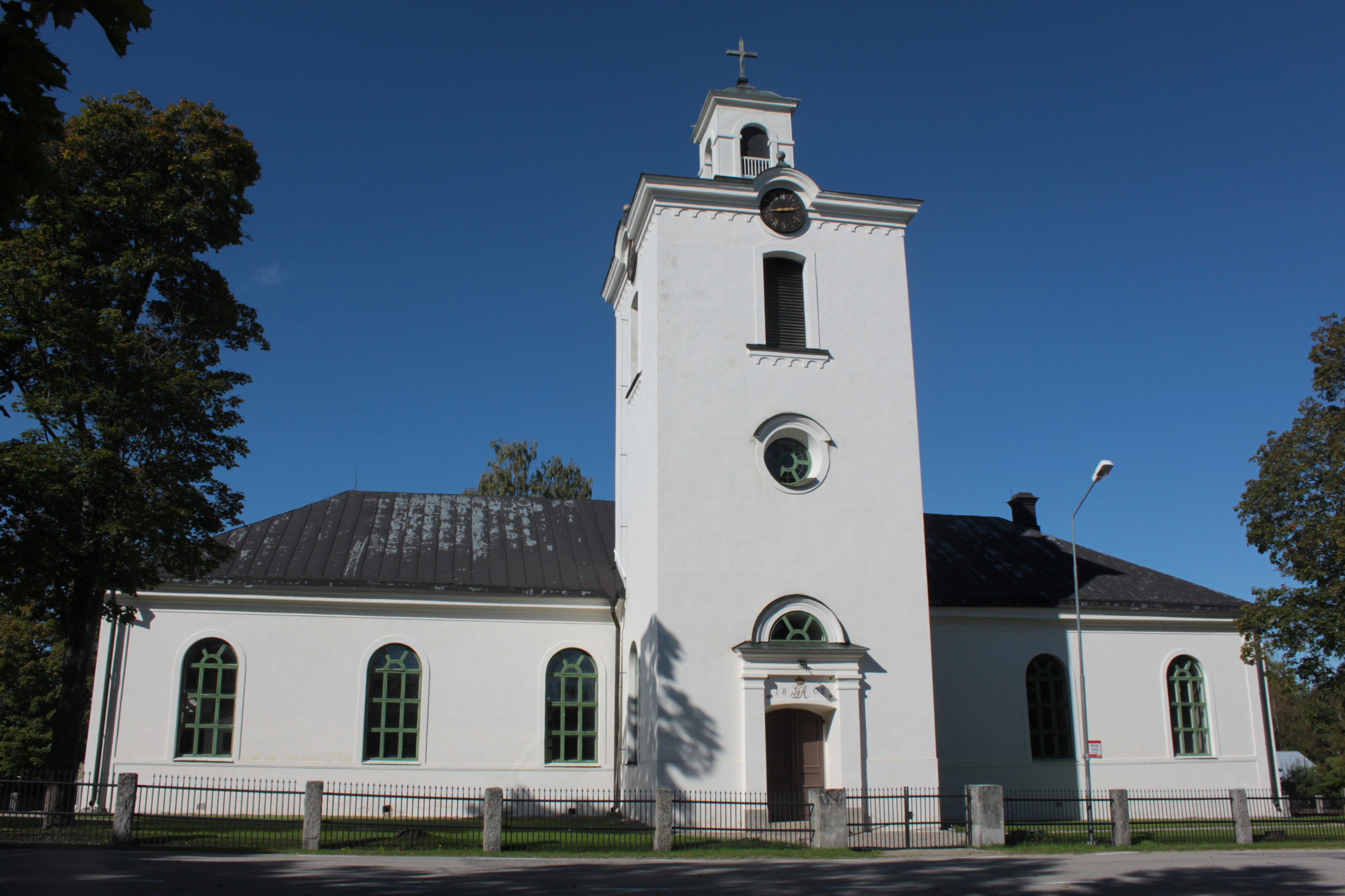 Skogs kyrka sedd från kallbäcksvägen.